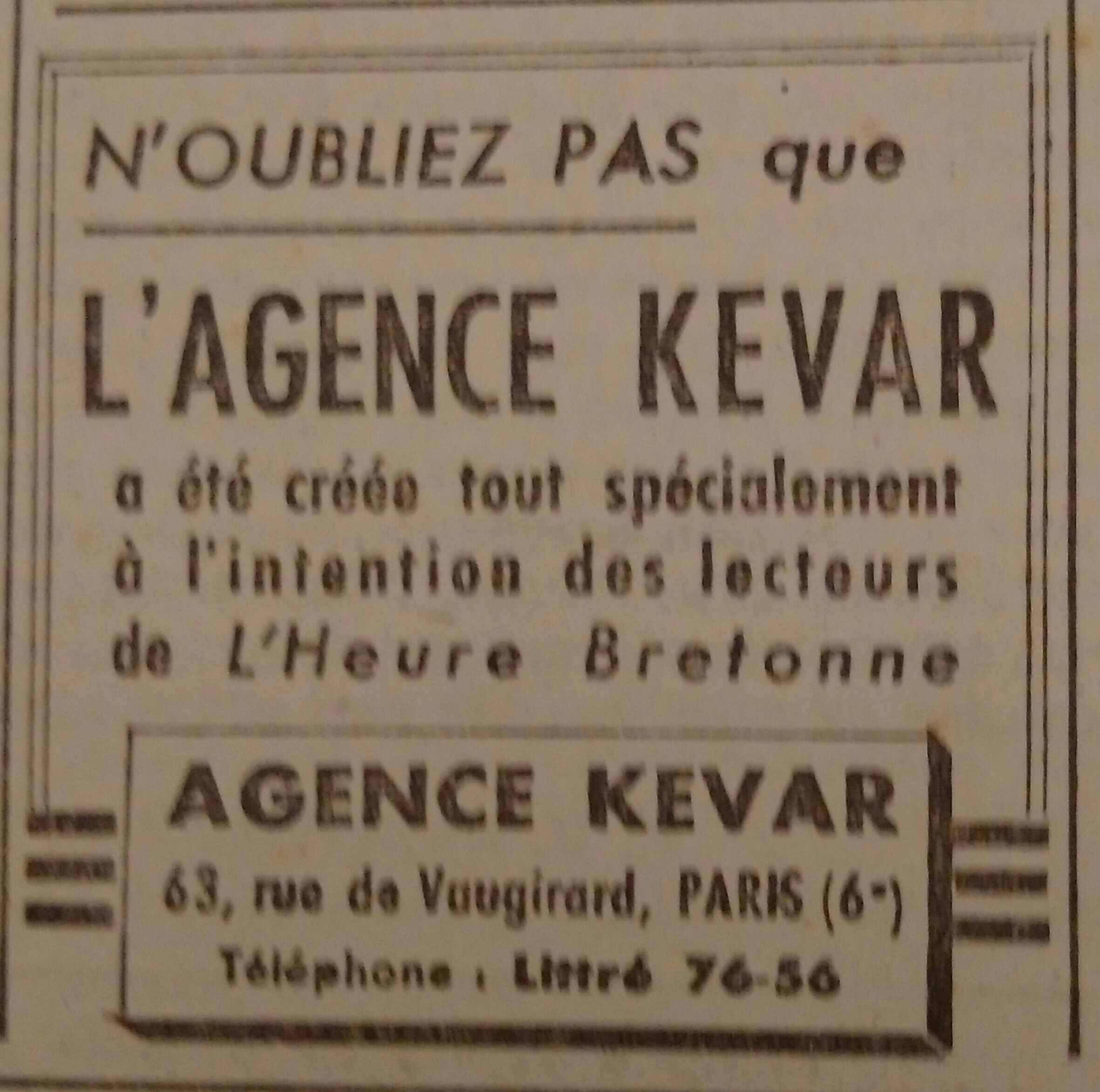 Bruderezh er gazetenn l'Heure Bretonne (Niverenn 176, d'ar 5 a viz Kerzu 1943) evit rann ekonomikel ar strollad Kevar